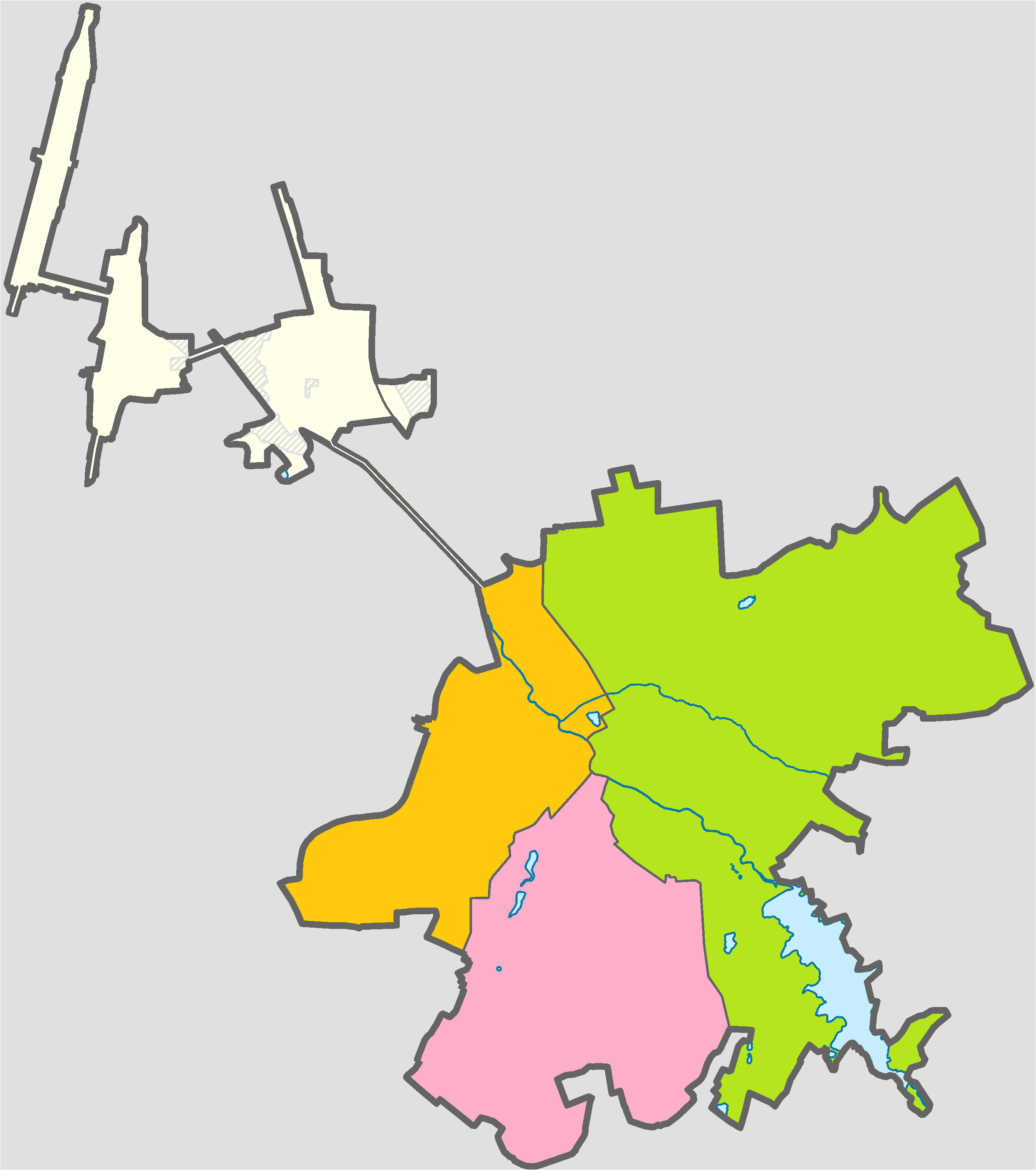 Районы Симферополя и подчинённые городу территории (пяти населённых пунктов)